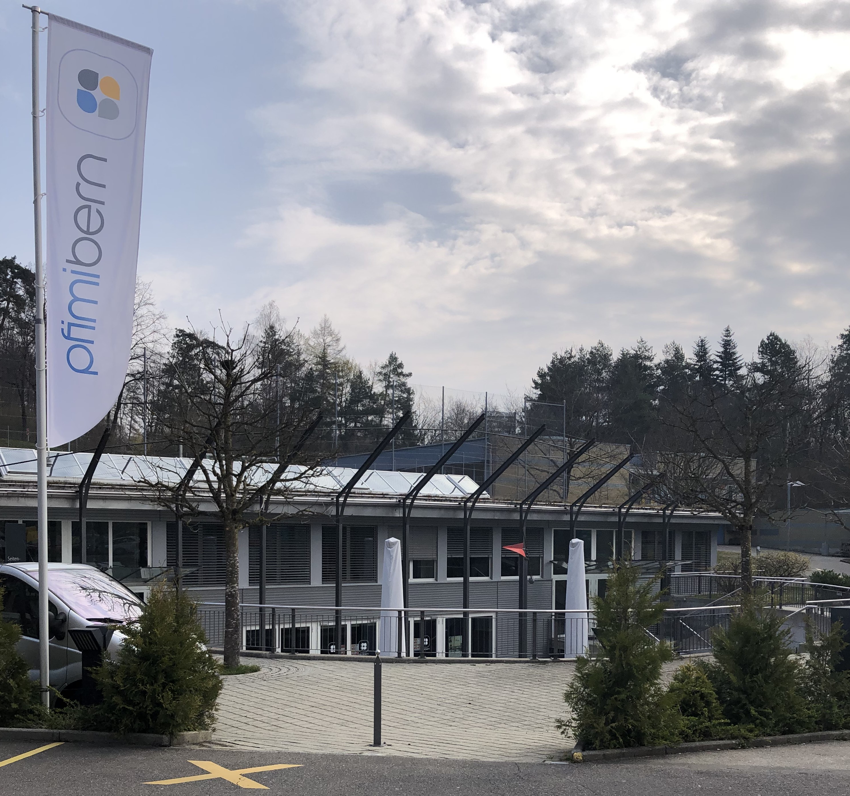 Hiolenacker PFIMI